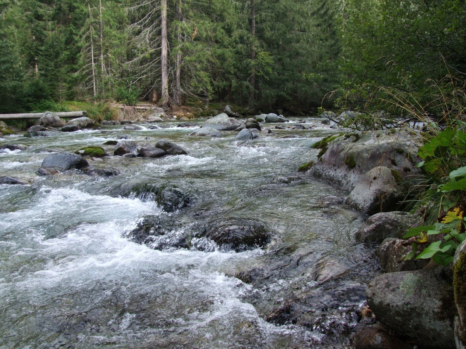 Biała Liptowska w Dolinie Cichej w Tatrach